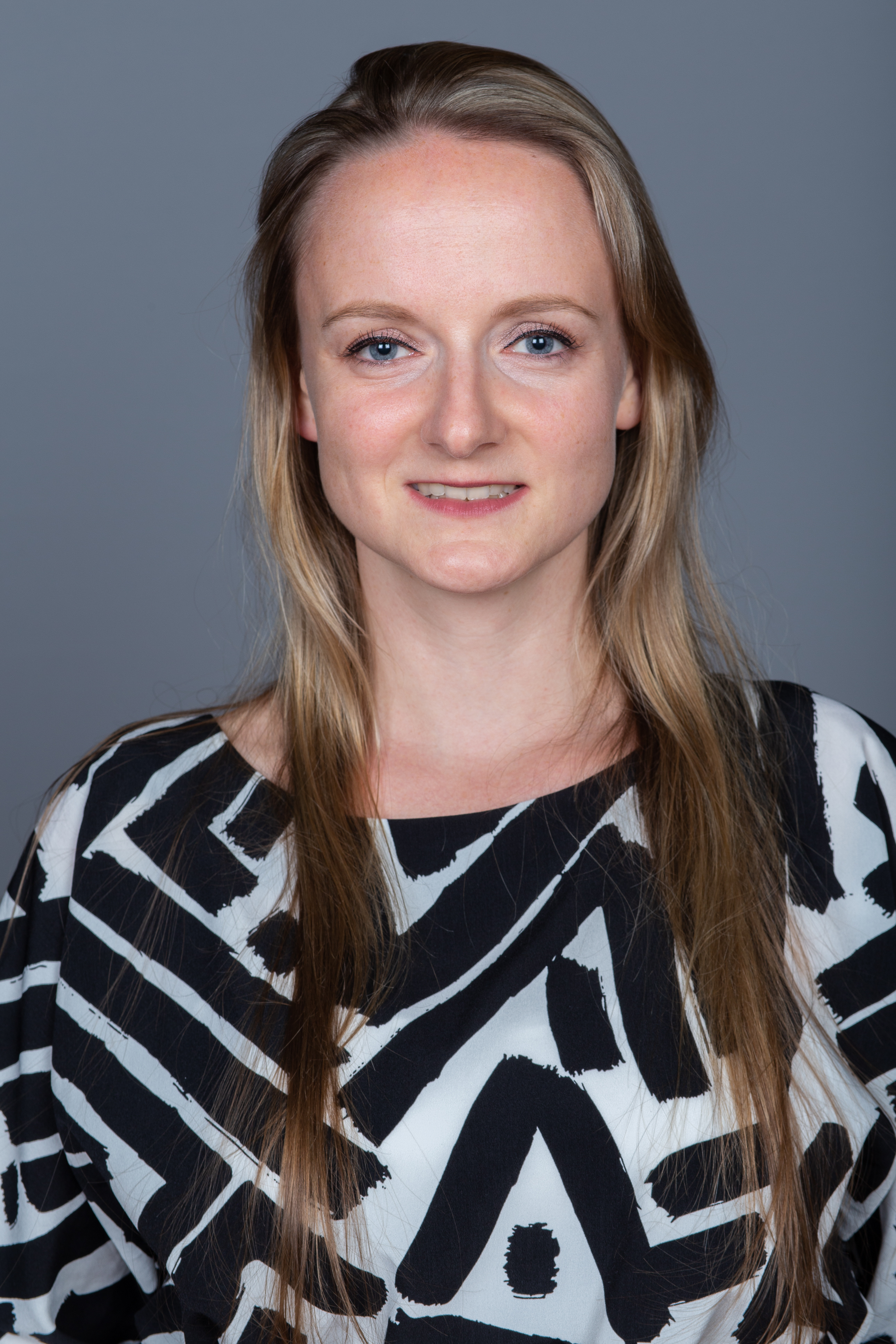 Abgeordnete(r) der Bürgerschaft der Freien und Hansestadt Hamburg Jennyfer Dutschke